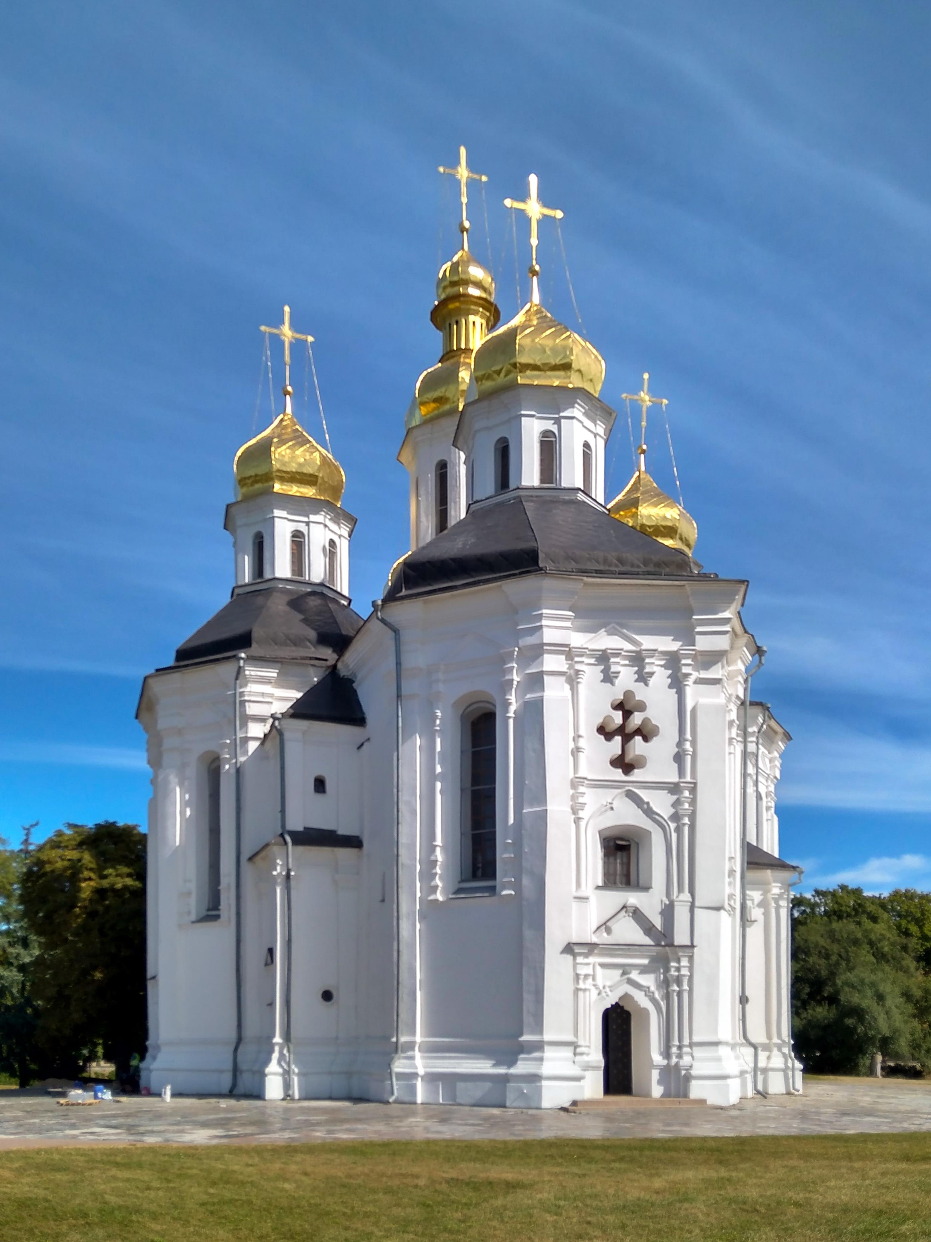 Катерининська церква (мур.), Чернігів, просп. Миру, 6-а